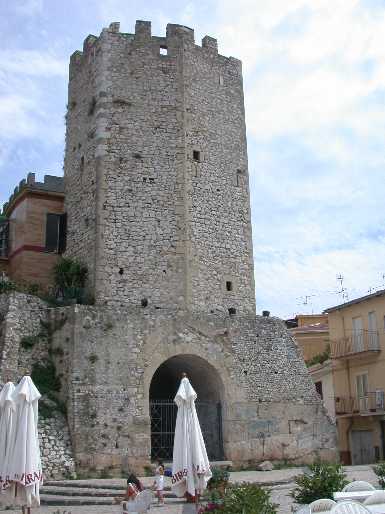 Formia (provincia di Latina, Lazio, Italia), Castellone, torre ottagonale.